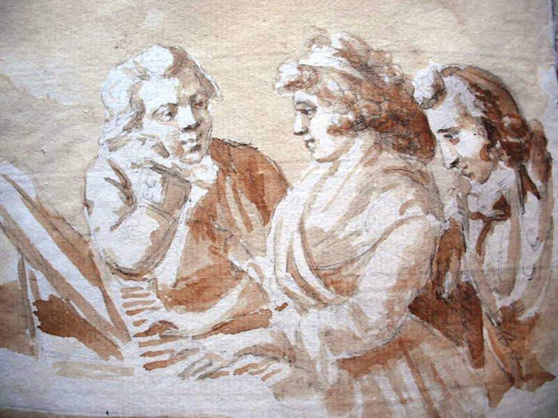 Celeste Coltellini Paesiello regardant chanter la Coltellini, späte 1780er Jahre. Das Bild ist möglicherweise seitenverkehrt ins Internet gestellt worden, siehe Carola Bebermeier: Materialitäten, Orte und Erinnerungen. Am Beispiel der Sängerin Celeste Coltellini. In: Lena Nieper; Julian Schmitz (Hrsg.): Musik als Medium der Erinnerung. Gedächtnis - Geschichte - Gegenwart. Bielefeld : transcript, 2016, ISBN 978-3-8376-3279-8, Abbildung 4: »Paesiello [sic] regardant chanter la Coltellini.«, Lavierung von Celeste Coltellini, Ende der 1780er Jahre. S. 187. Dort eine Schwarz-weiß-Abbildung mit dem angeführten handschriftlichen Bildtitel. Bei Bebermeier wird nicht angesprochen, von wem die handschriftliche Legende stammt.